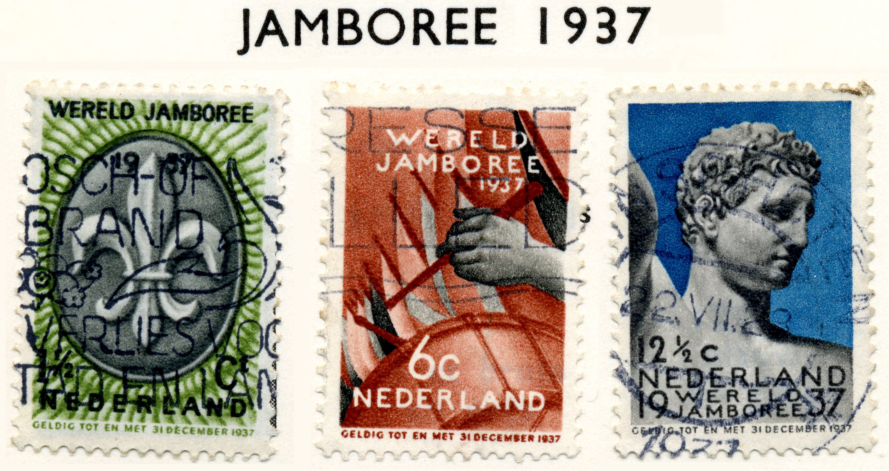 Jamboree-zegels (1937). Schild met lelie-embleem van de padvinders / Vlaggenbeeld met marstrommel / De Griekse God Hermes